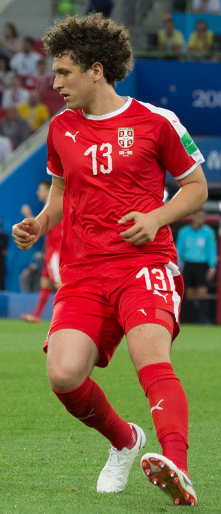 Сборная Бразилии оставляет Сербию за бортом ЧМ-2018 и выходит в плей-офф